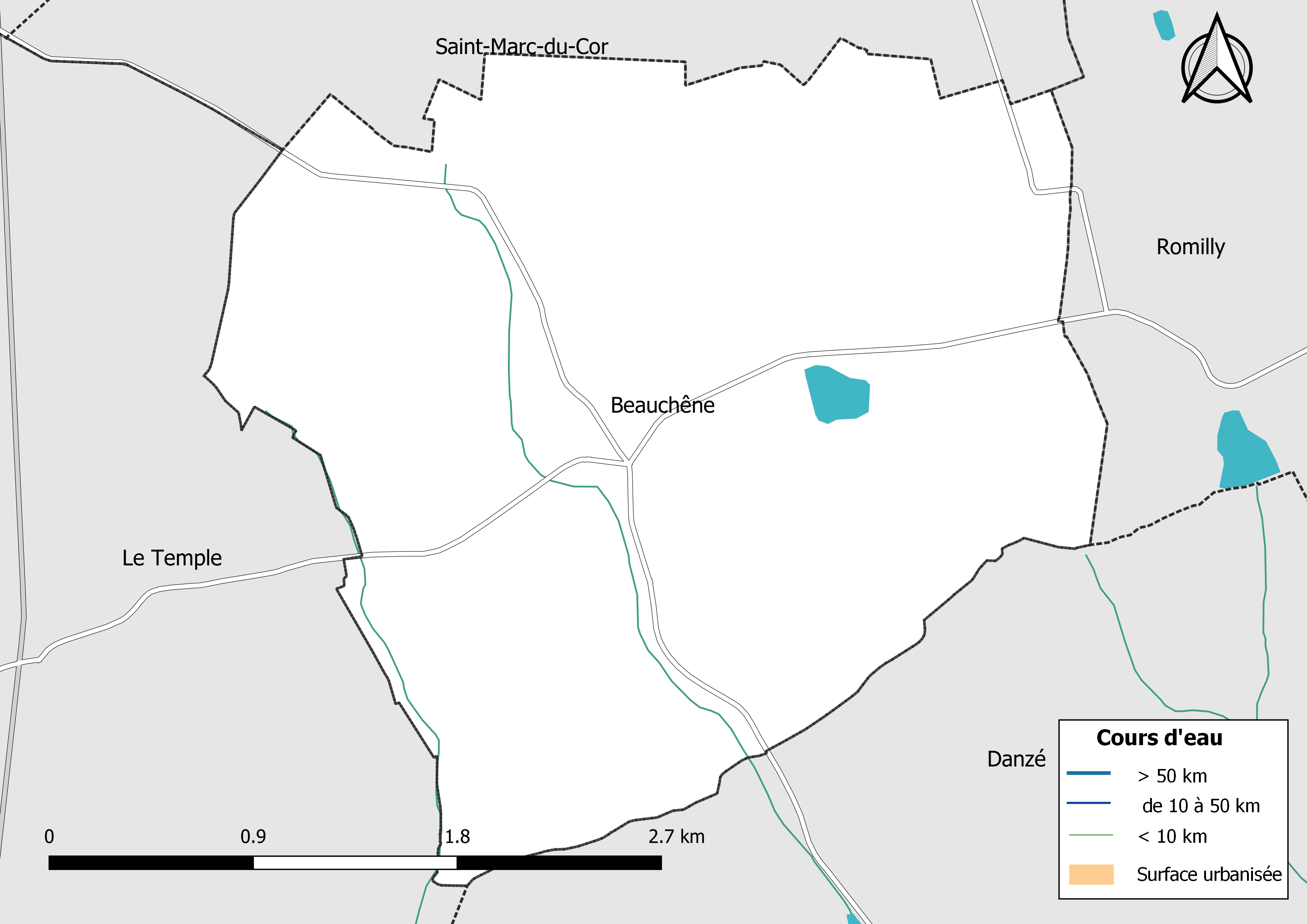 Carte du réseau hydrographique de la commune de Beauchêne (Loir-et-Cher) (France).